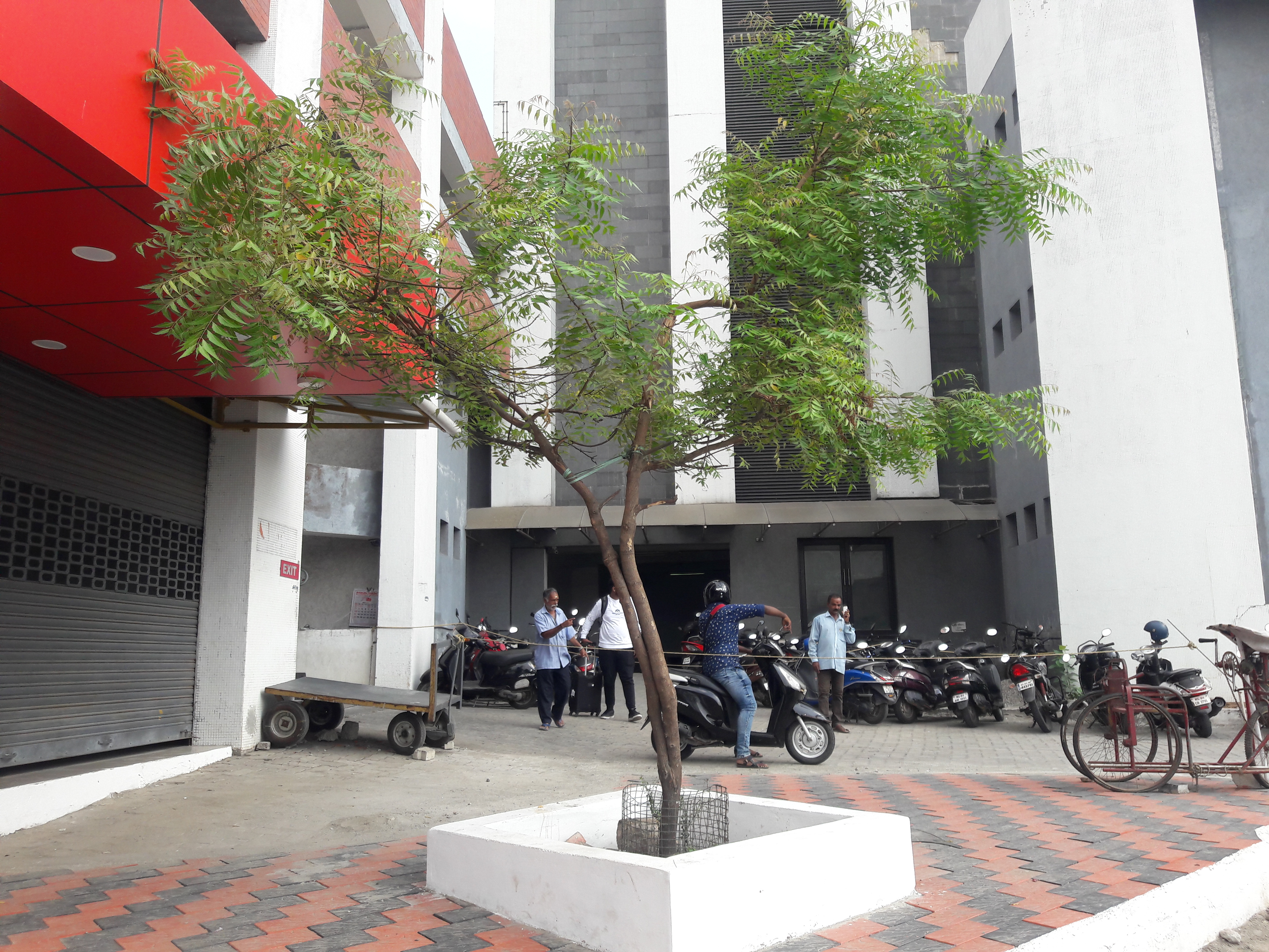 കേരള സ്റ്റേറ്റ് റോഡ് ട്രാൻസ്പോർട്ട് കോർപ്പറേഷൻ തിരുവനന്തപുരം. വളപ്പില്‍ നട്ട് പരിപാലിക്കുന്ന ഒരു ആര്യവേപ്പ് Neem tree ശാസ്ത്രീയ നാമം Azadirachta indica കുടുംബം Meliaceae.